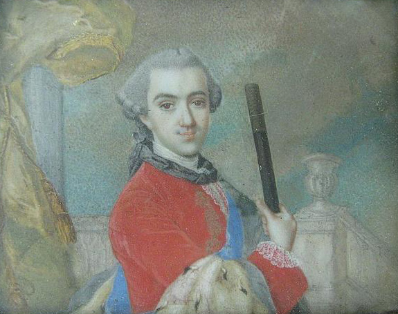 Беларуская (тарашкевіца): Партрэт Юзэфа Паўліна Сангушкі (Juzef Paŭlin Sanguška)